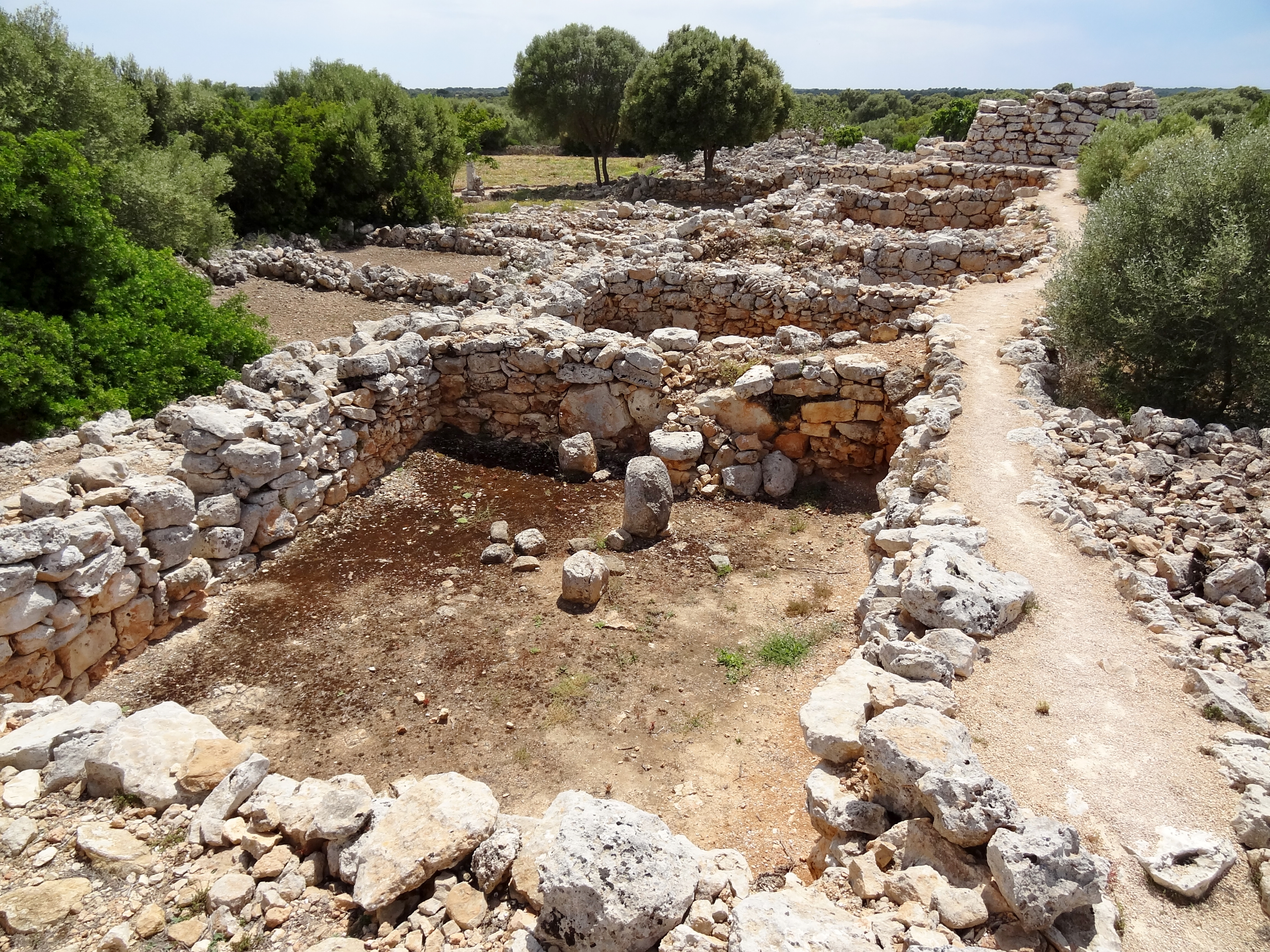 Ausgrabungsstätte von Capocorb Vell, Gemeinde Llucmajor, Mallorca, Spanien